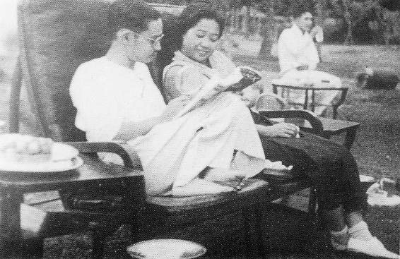 ร.7 และ พระนางรำไพพรรณี